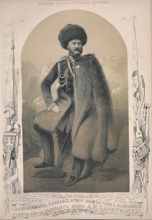 General-Adiutant Kniaz' Bariatinskii, A. I.